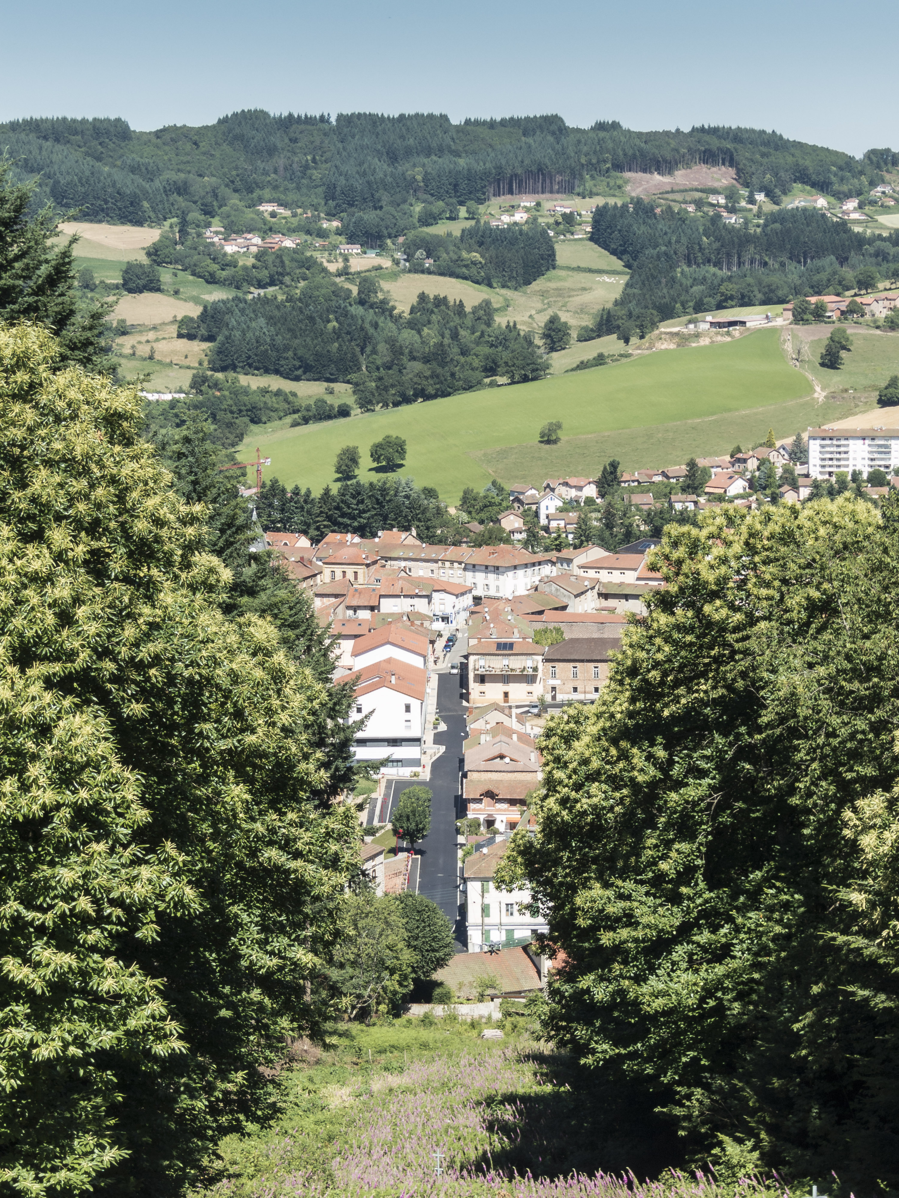 Blick von der Kapelle